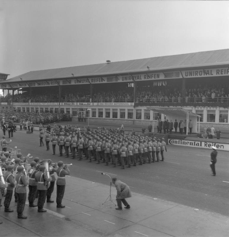 20 Jahre NATO. Bundeswehrparade auf dem Nürburgring